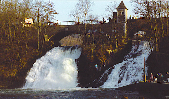 self made